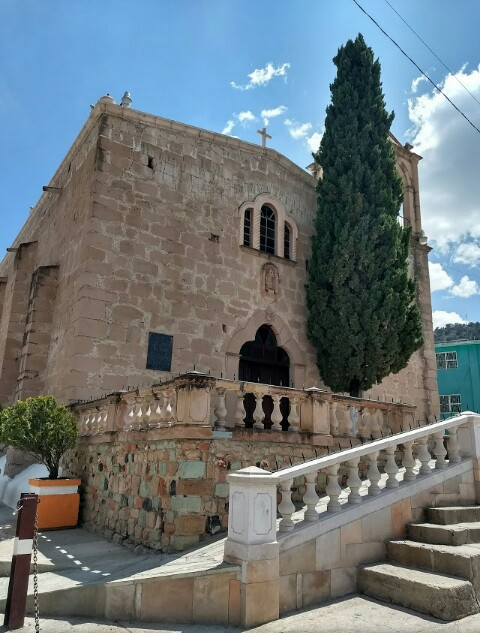 Parroquia